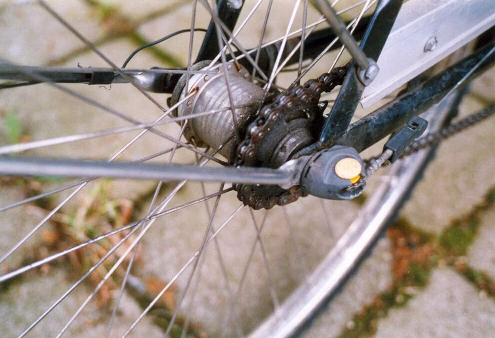 Nabenschaltung an einem modernen Fahrrad